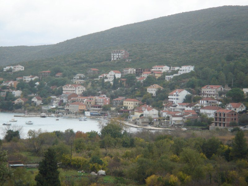 Pogled na selo